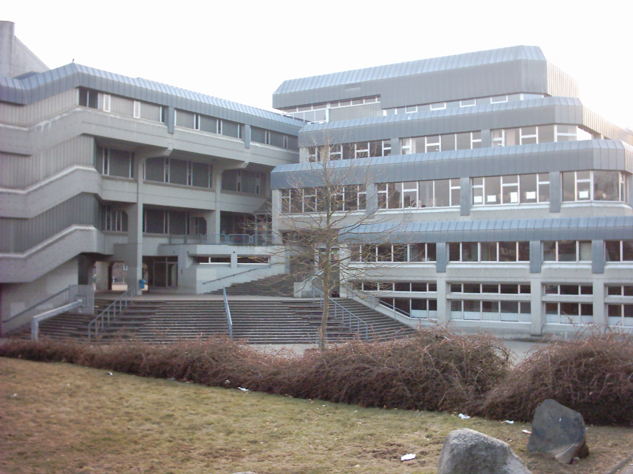 Realschule in Menden, Sankt Augustin